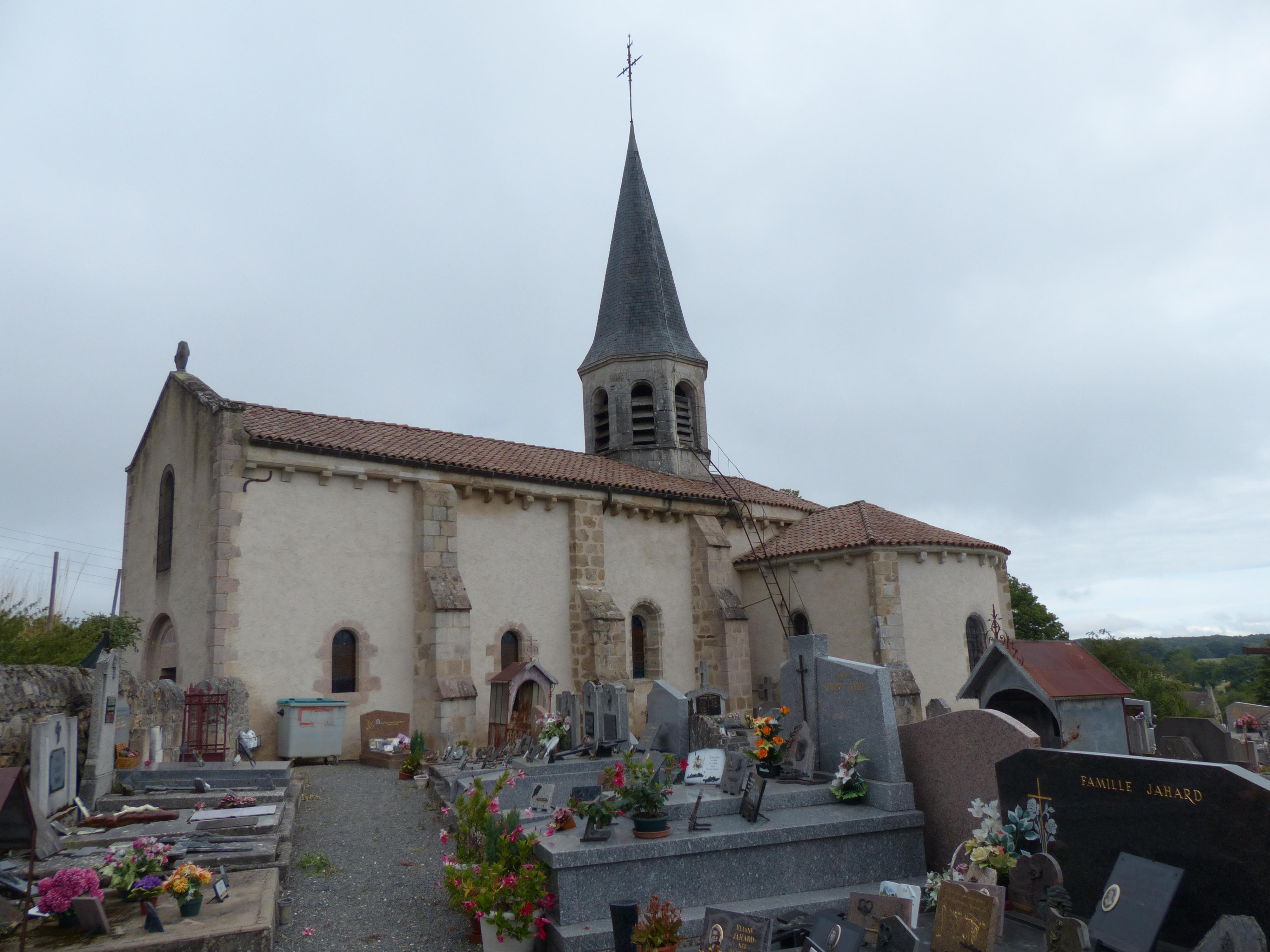 Église de Nades, Allier (France).